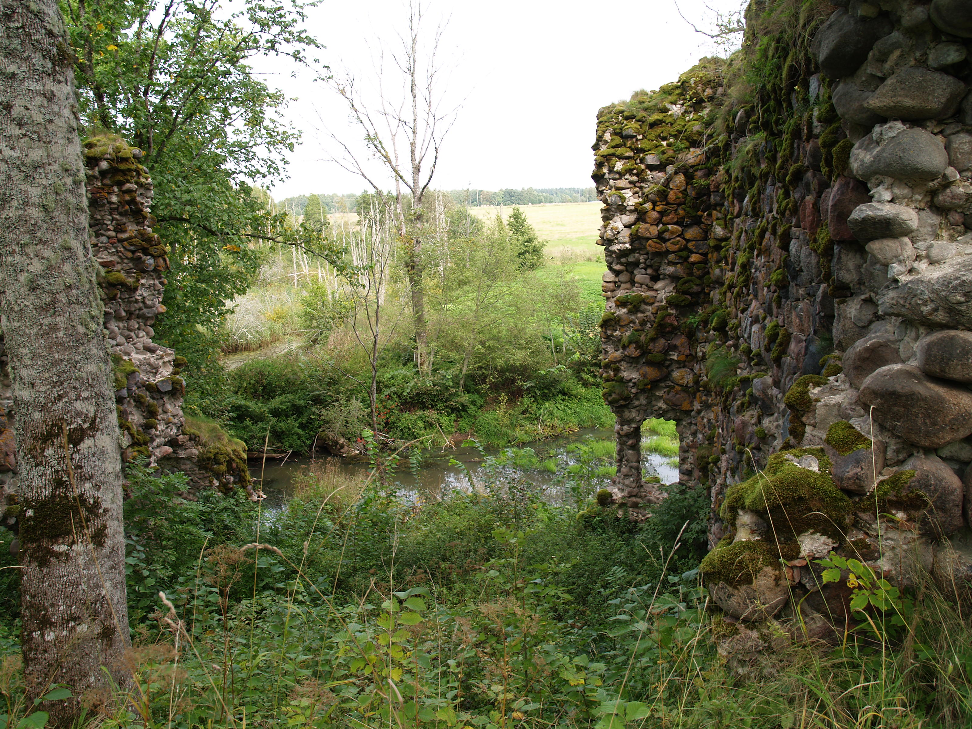 Tarvastu ordulinnuse varemed.